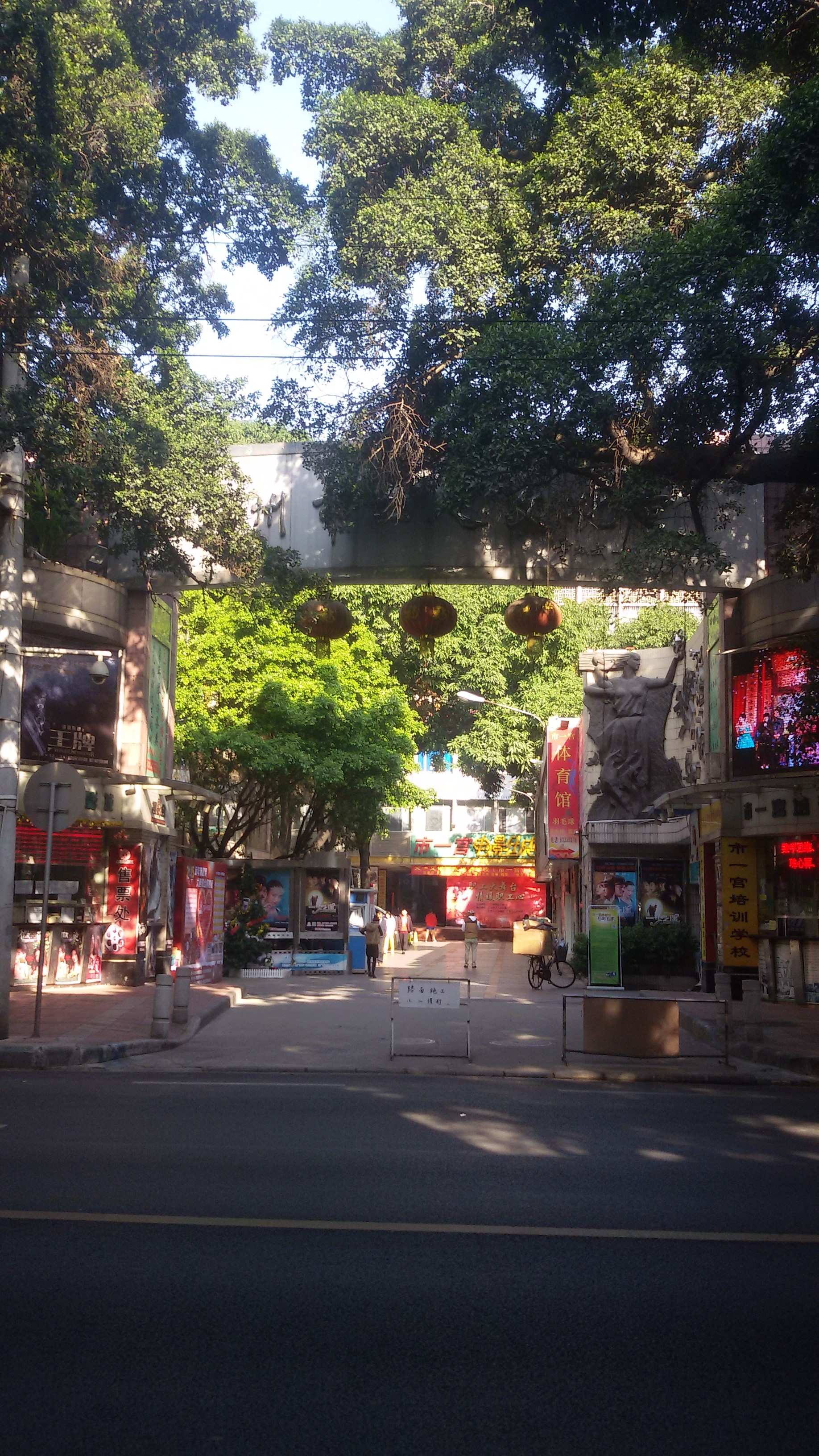 粵語: 广州市第一工人文化宫